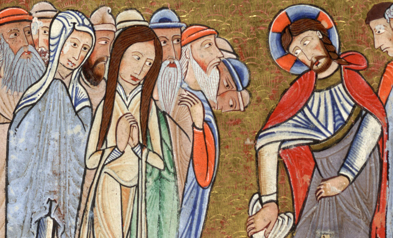 Detail of the raising of Lazarus, Mary and Martha meet Jesus. From the Hunterian Psalter, a twelfth century illuminated manuscript, thought to have been produced in England c. 1170.